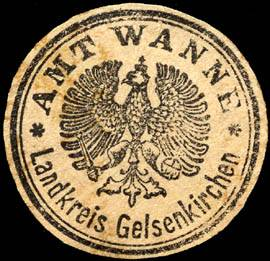 Sealing stamp Title: Amt Wanne - Landkreis Gelsenkirchen Description: grau, schwarz Place: Wanne size: 3 cm